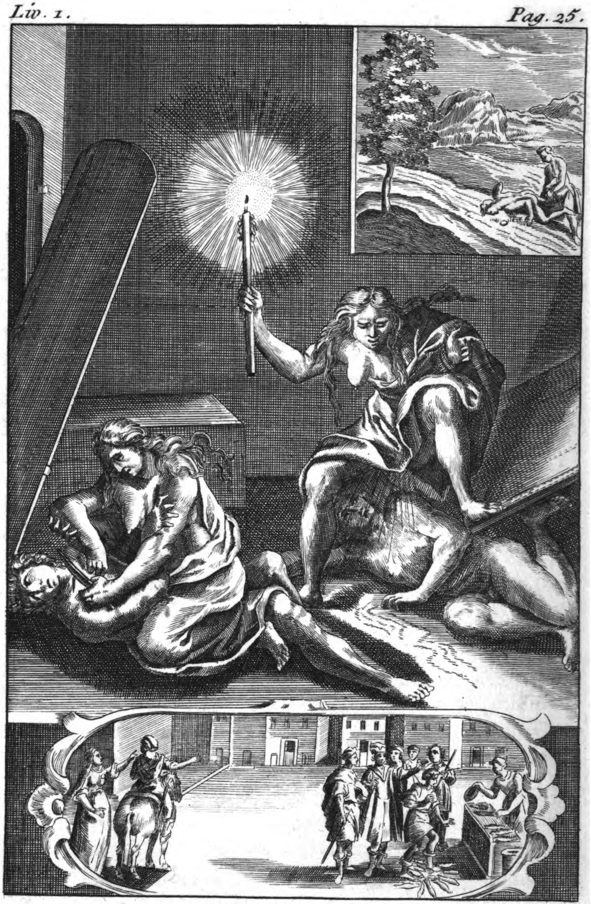 Gravure de l'ouvrage Les Métamorphoses ou L'Ane d'or, Auteur Lucius Apuleius, traduit du latin par Compain De Saint-Martin, édité par Jean-François Bastien, 1787, édition bilingue latin français. Volume 1 / 2, page 25